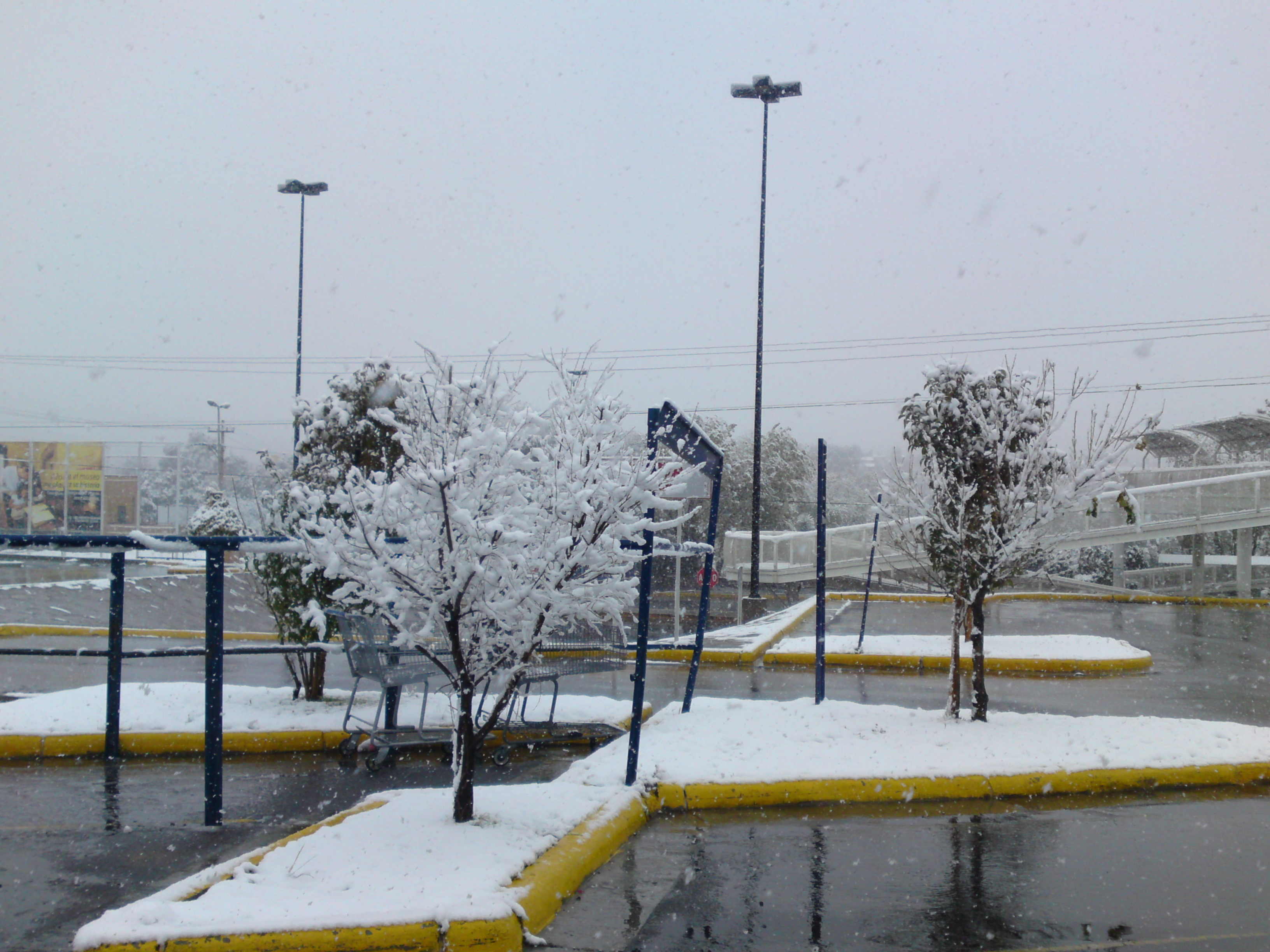 Nevada 2010 Sams